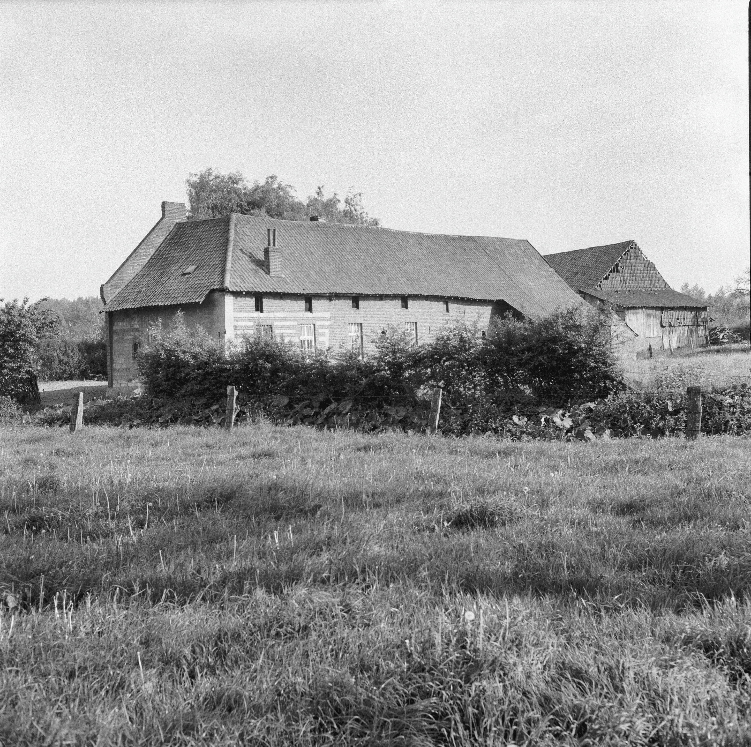 nummer 10, voormalige Oliemolen, aanzicht